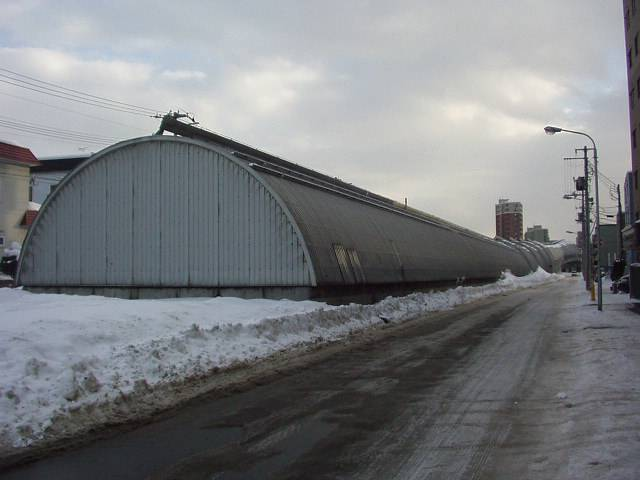 札幌市営地下鉄南北線の地下地上接続部。撮影位置: 北海道、札幌市、豊平区。環状通から、南向きに撮影。